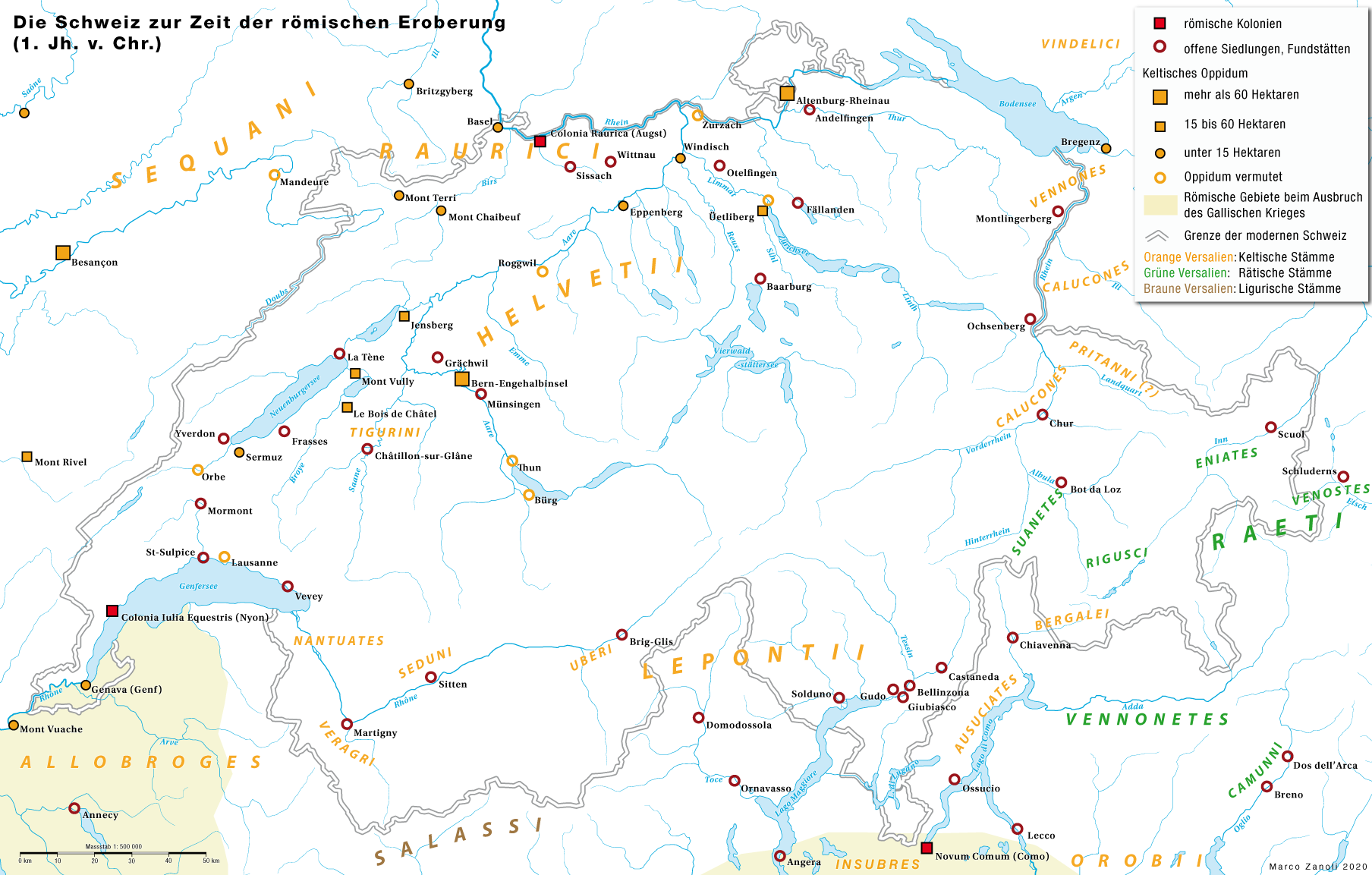 Das Gebiet der heutigen Schweiz zur Zeit der römischen Eroberung im 1. Jahrhundert vor Christus. Keltische (Helvetier, Rauraker), Ligurische (Lepontier u.a.) und Rätische Siedlungen und Fundstätten der La Tène-Zeit